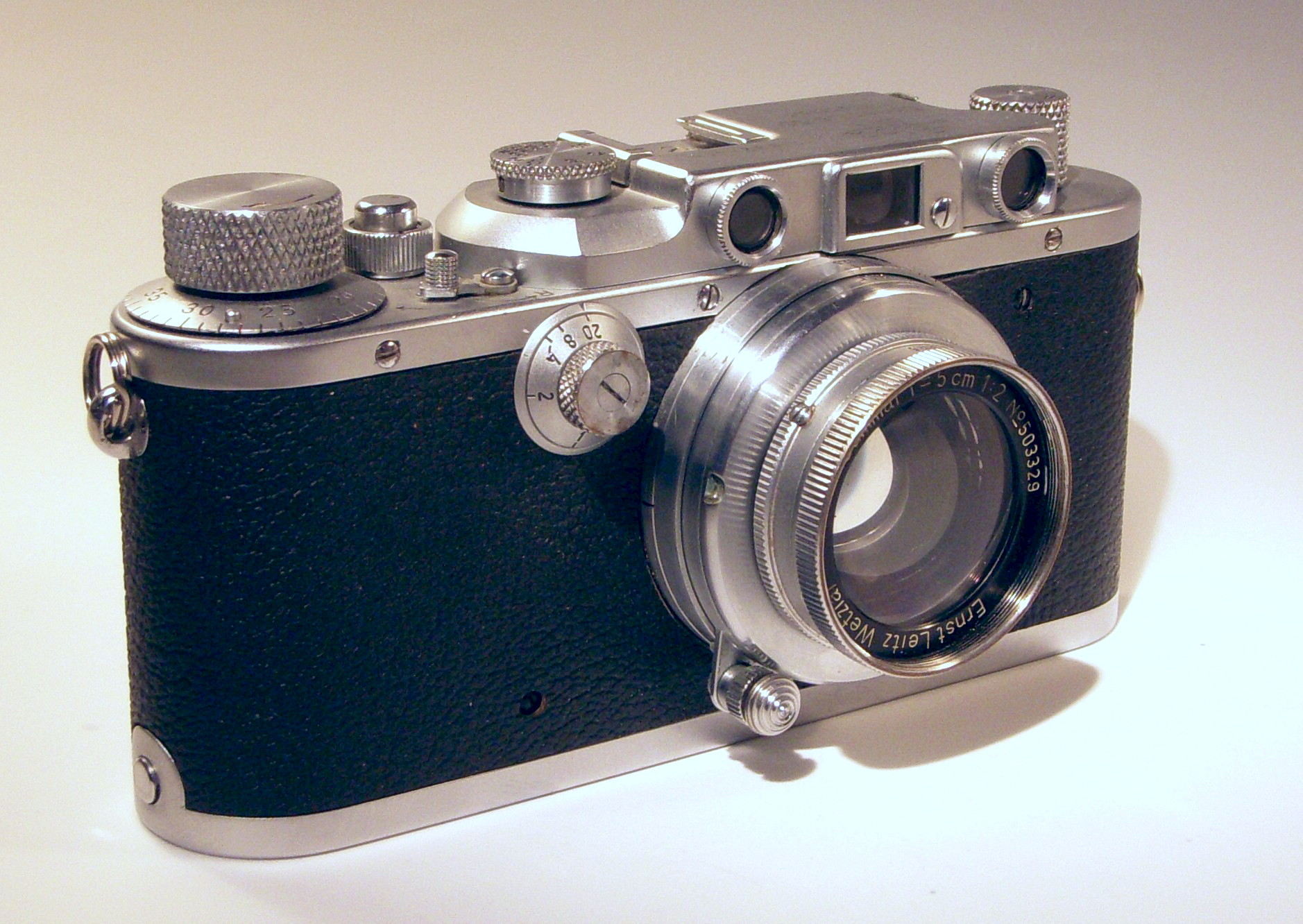 Leica III f